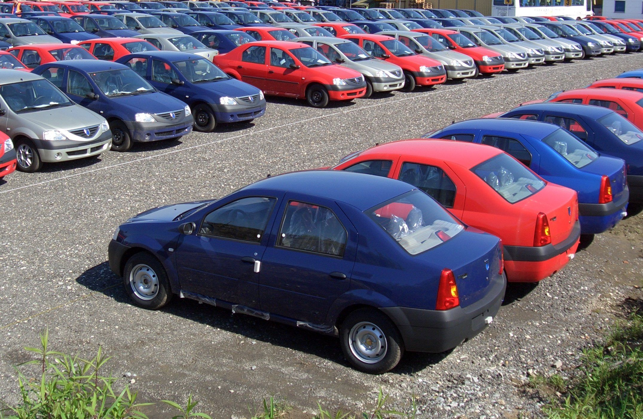 Dacia Logan, Baujahr 2005. Einige Dutzend Logan warten im Passauer Donau-Hafen auf den Weitertransport nach Polen und Tschechien.